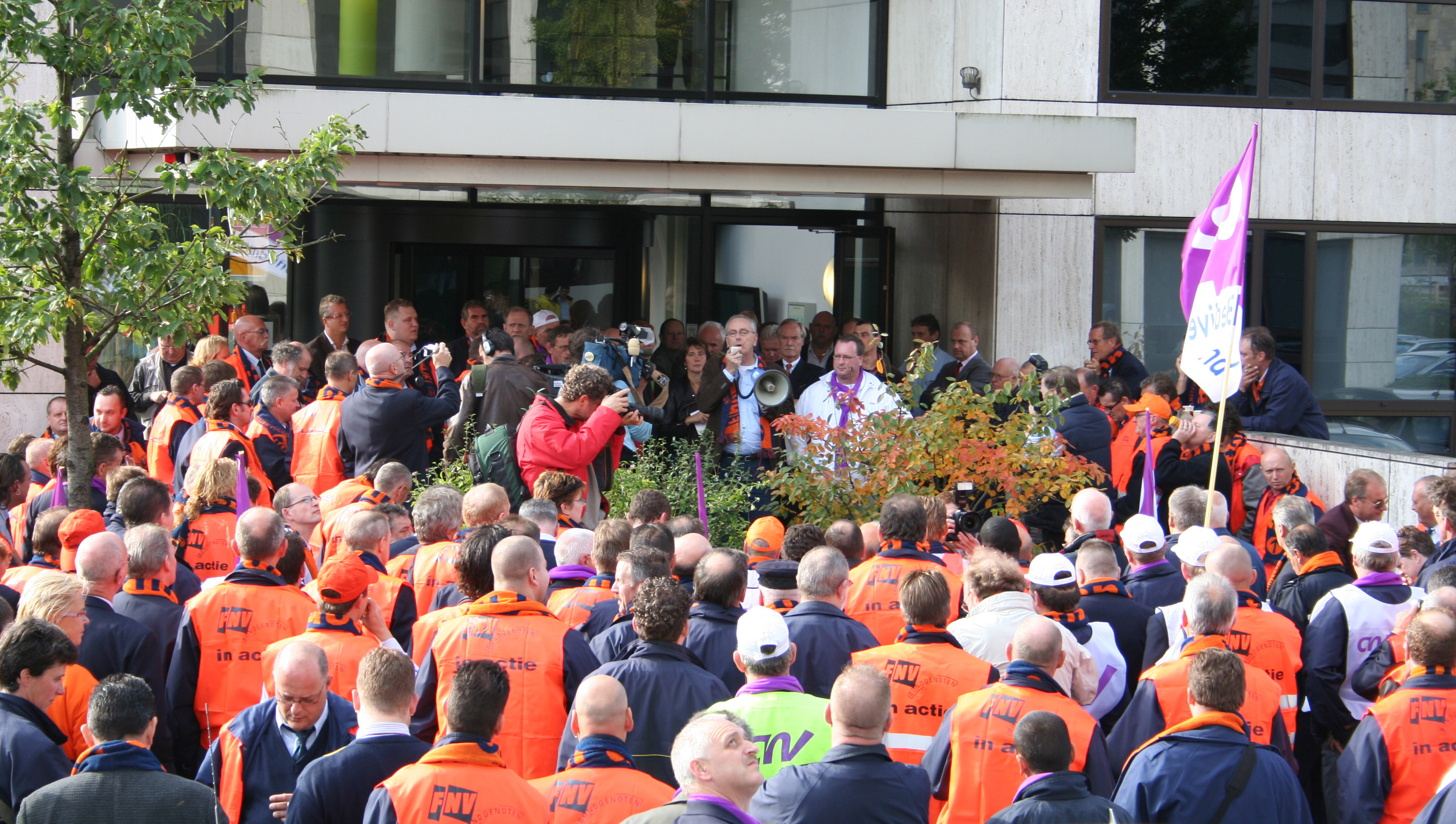 Staking BBA chauffeurs